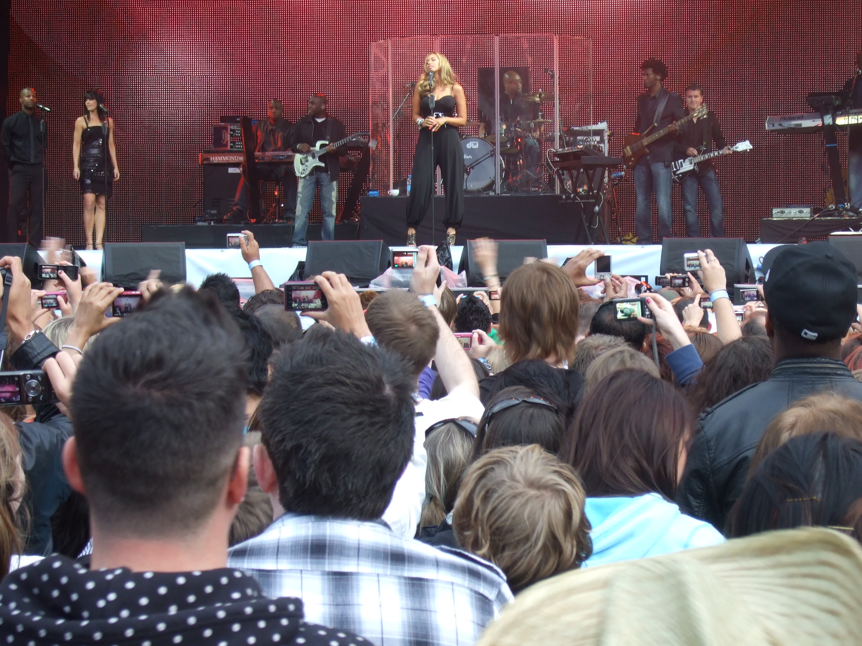 Leona Lewis at Capital FM's Summertime Ball in 2009